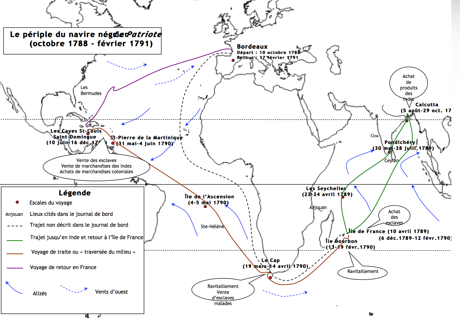 Périple avec escales du navire négrier bordelais "Le Patriote" entre 1788 et 1791. Animation pédagogique de Philippe Gardey, publiée par Estelle Pernot sur